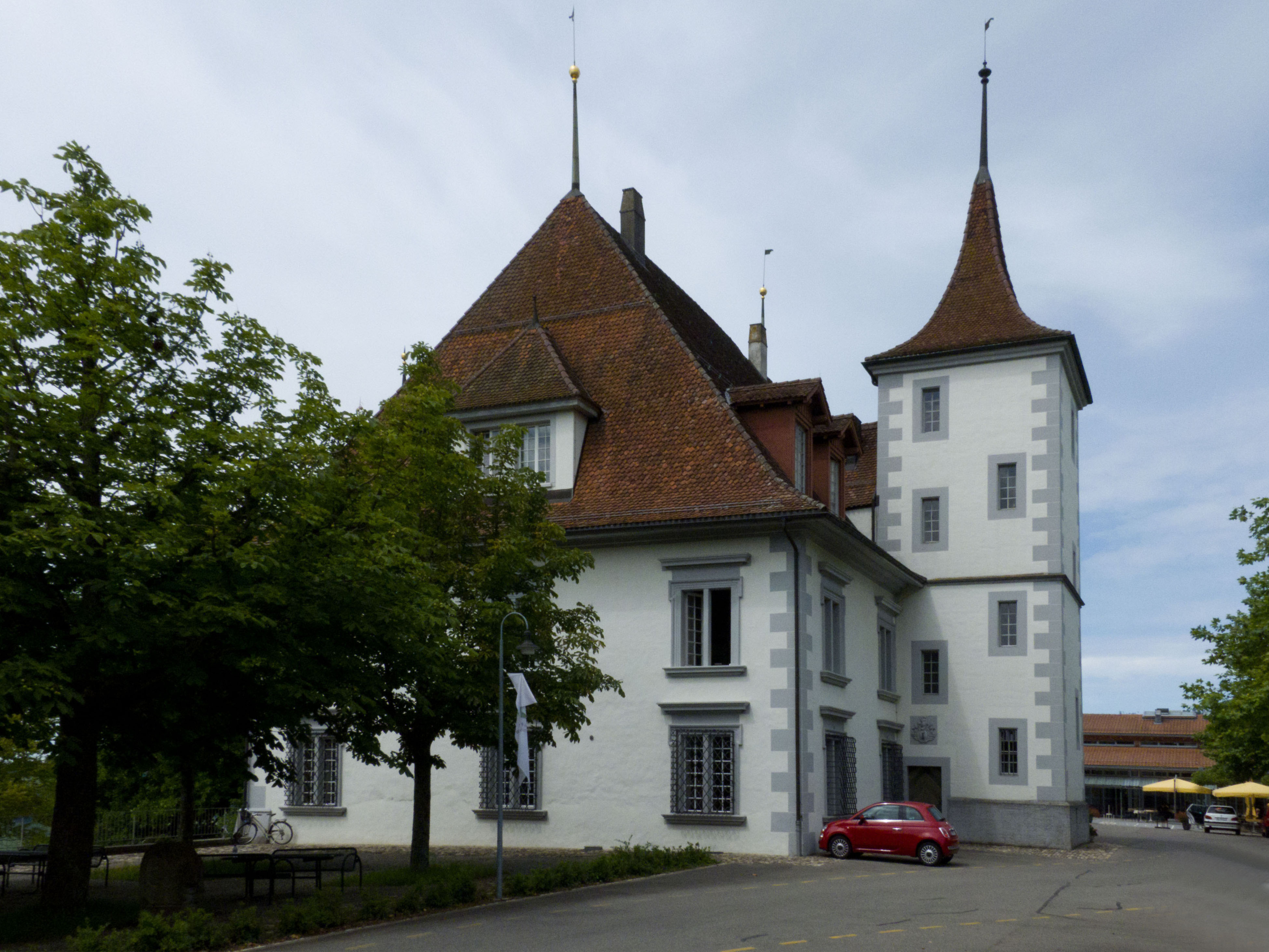 Frühbarockes Schloss von Samuel Jenner 1664 erbaut. Seit 1875 Oberländisches Pflegeheim, jetzt Wohn- und Pflegeheim Utzigen